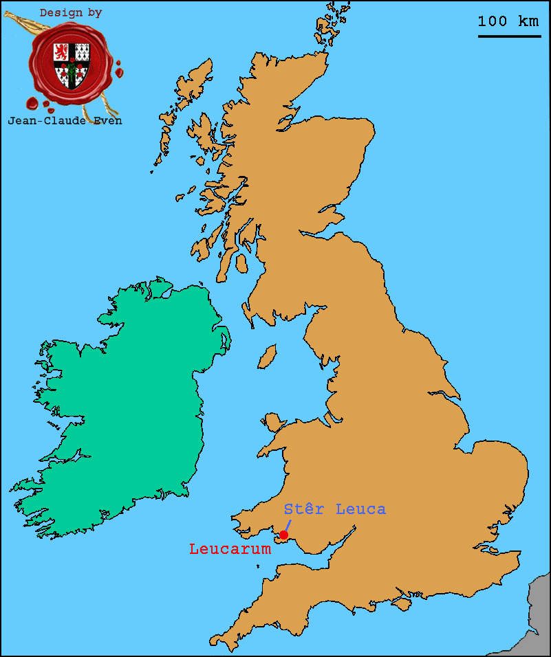 Loughor - Leucarum